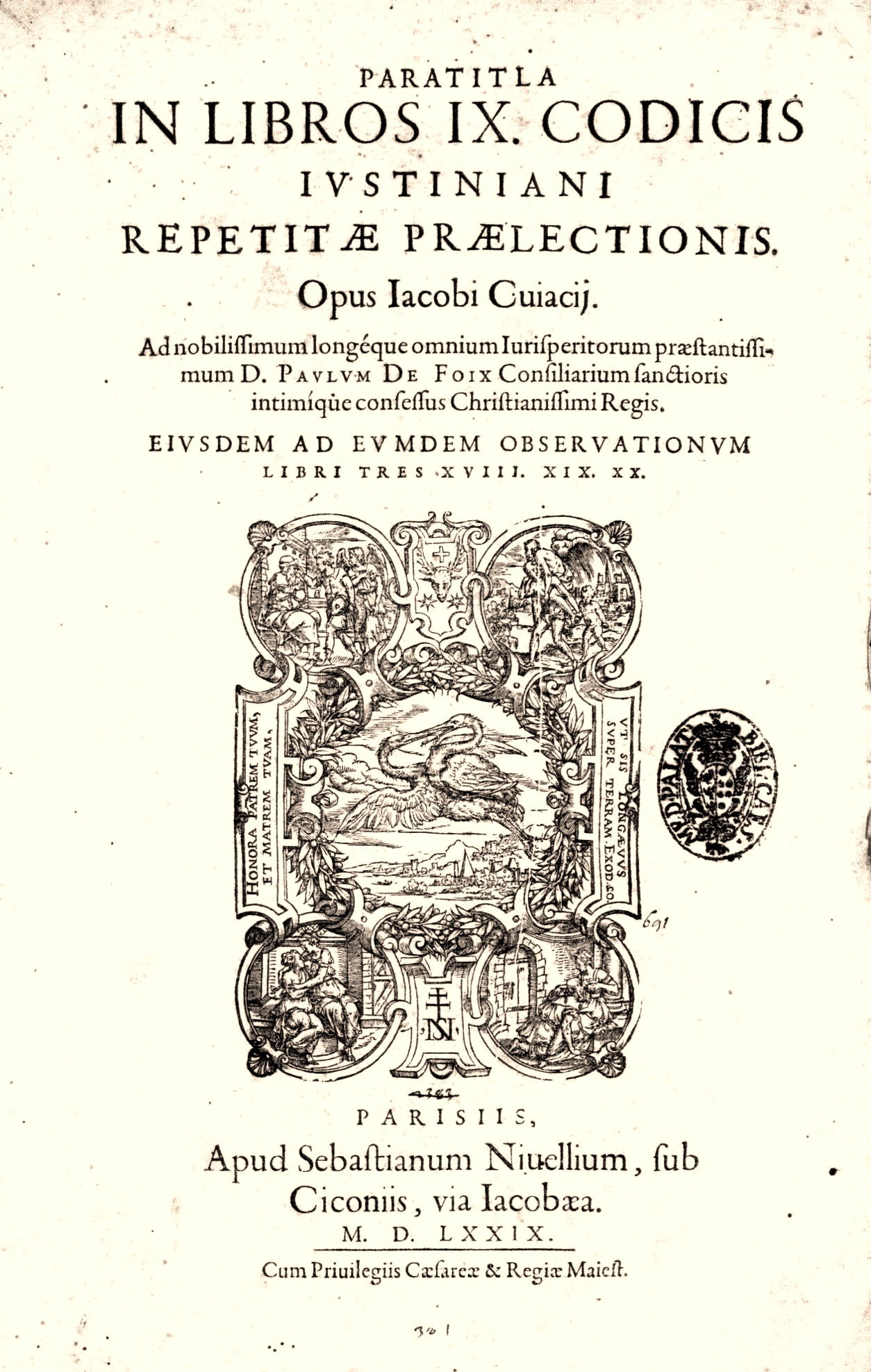 Portada de l'obra "Paratitla in libros IX codicis Iustiniani repetitae praelectionis. Eiusdem ad eumdem Obseruationum libri tres, XVIII, XIX, XX" de Jacques Cujas. Parisiis (París): Apud Sebastianum Nivellium, 1579.